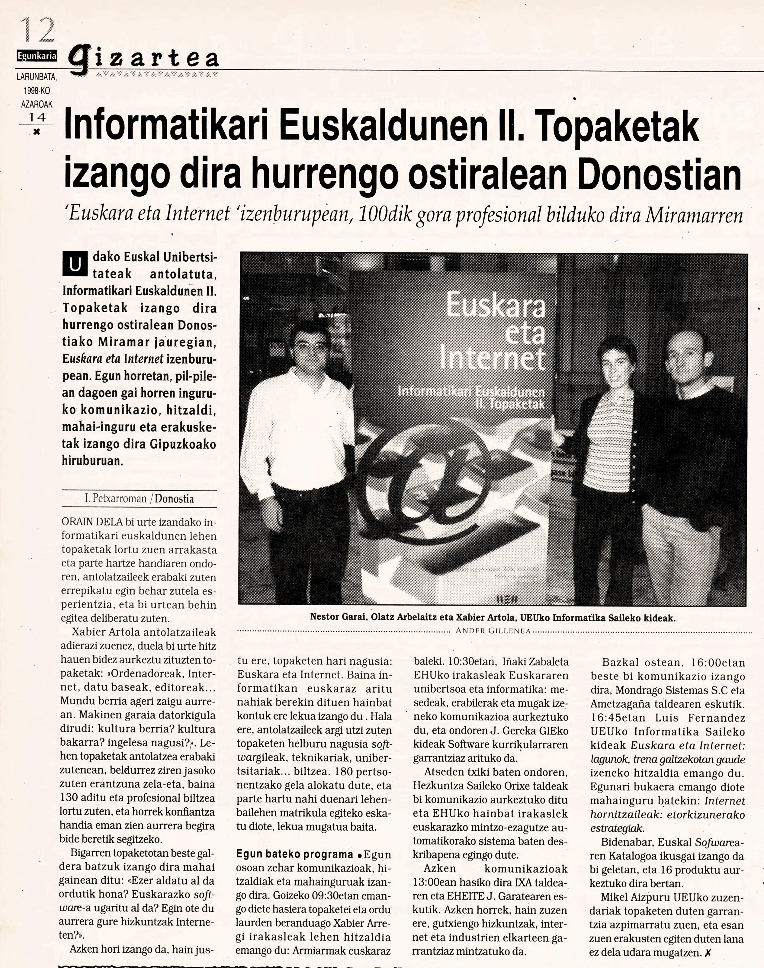 Informatikari Euskaldunen II. Bilkura (1998). Nestor Garai, Olatz Arbelaitz eta Xabier Artola antolatzaileak